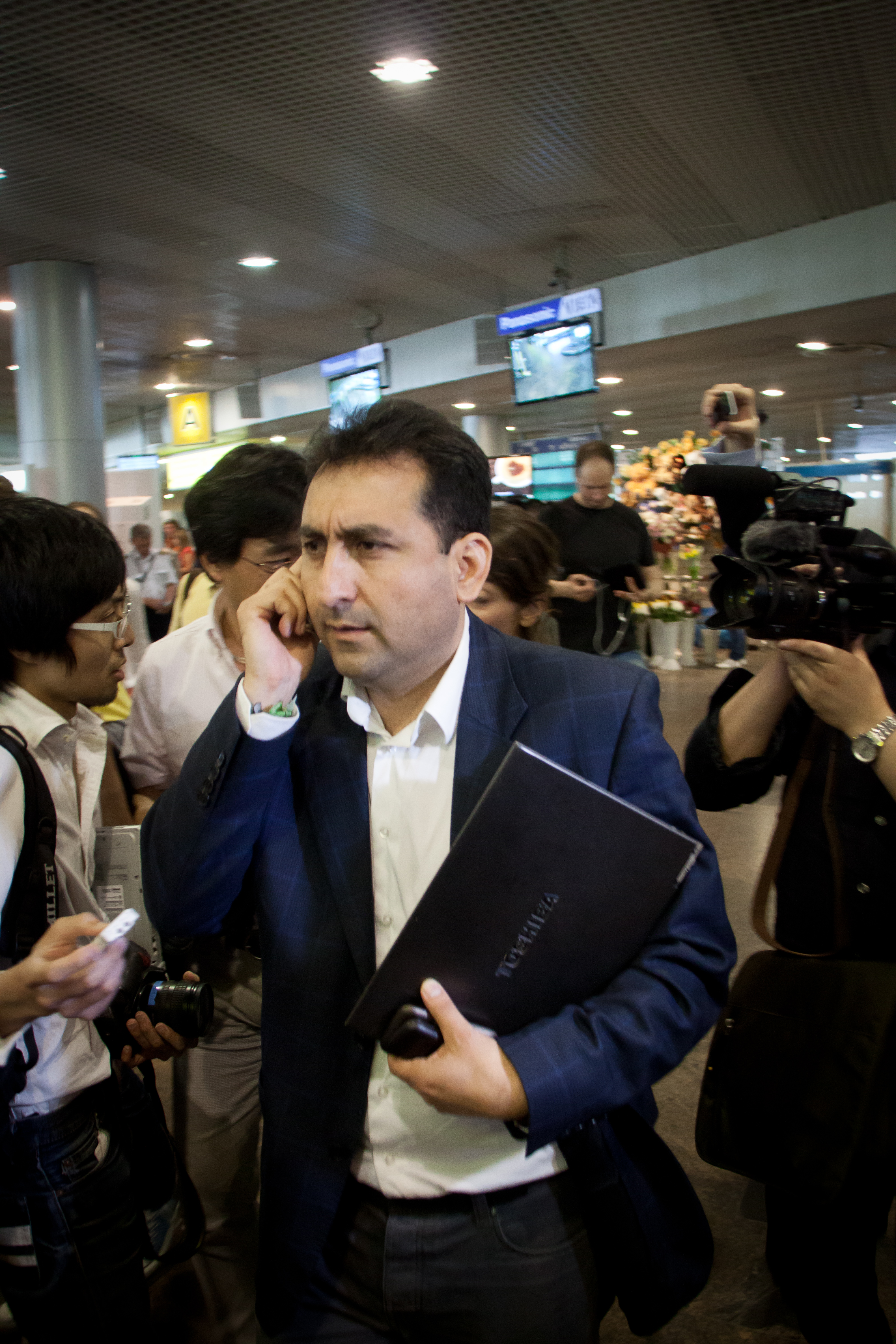 Консул Эквадора Фидель Нарваэс (Fidel Narváez) в аэропорту Шереметьево (терминал F)